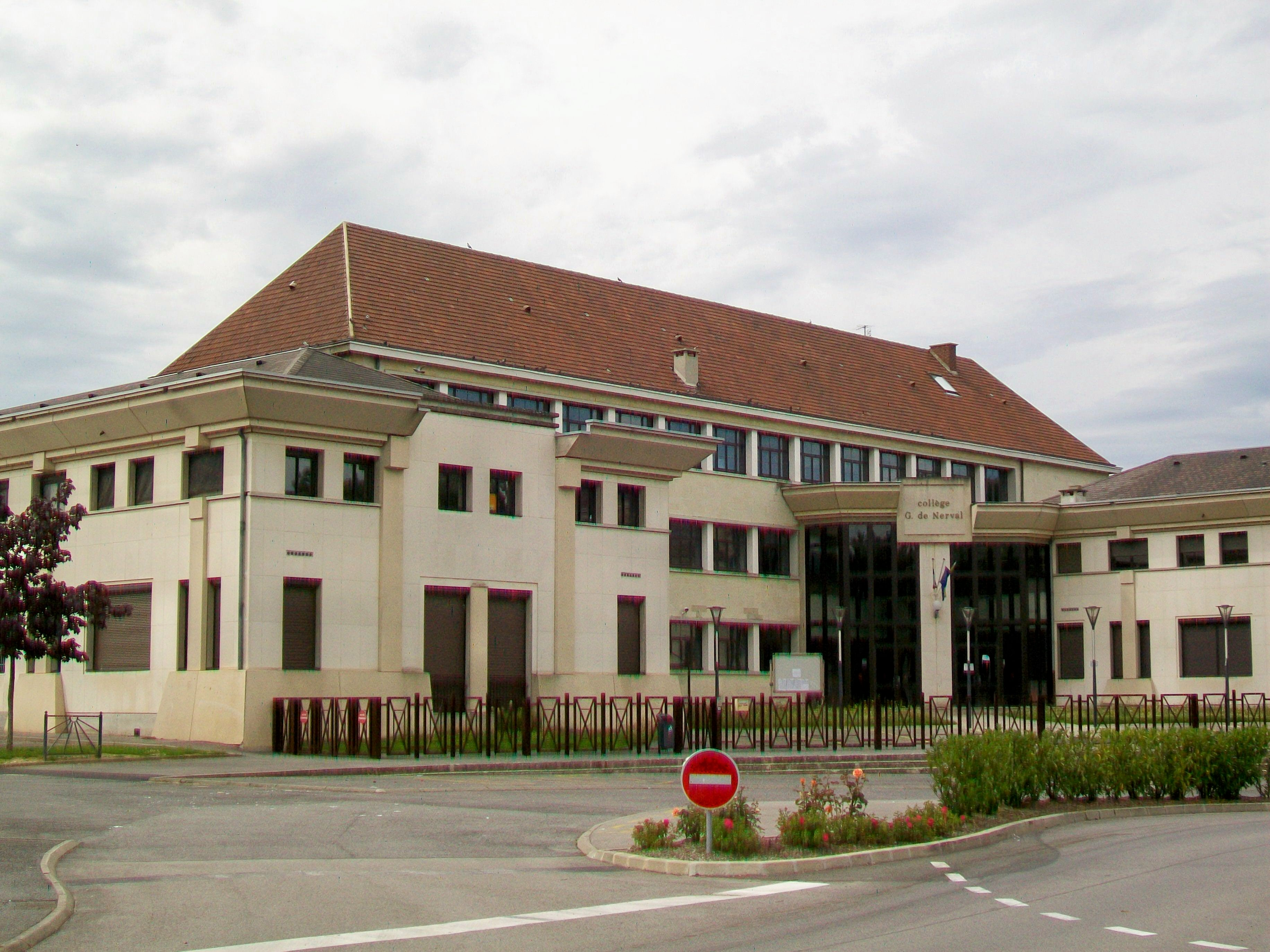 Le collège Gérard-de-Nerval, rue Gérard-de-Nerval.